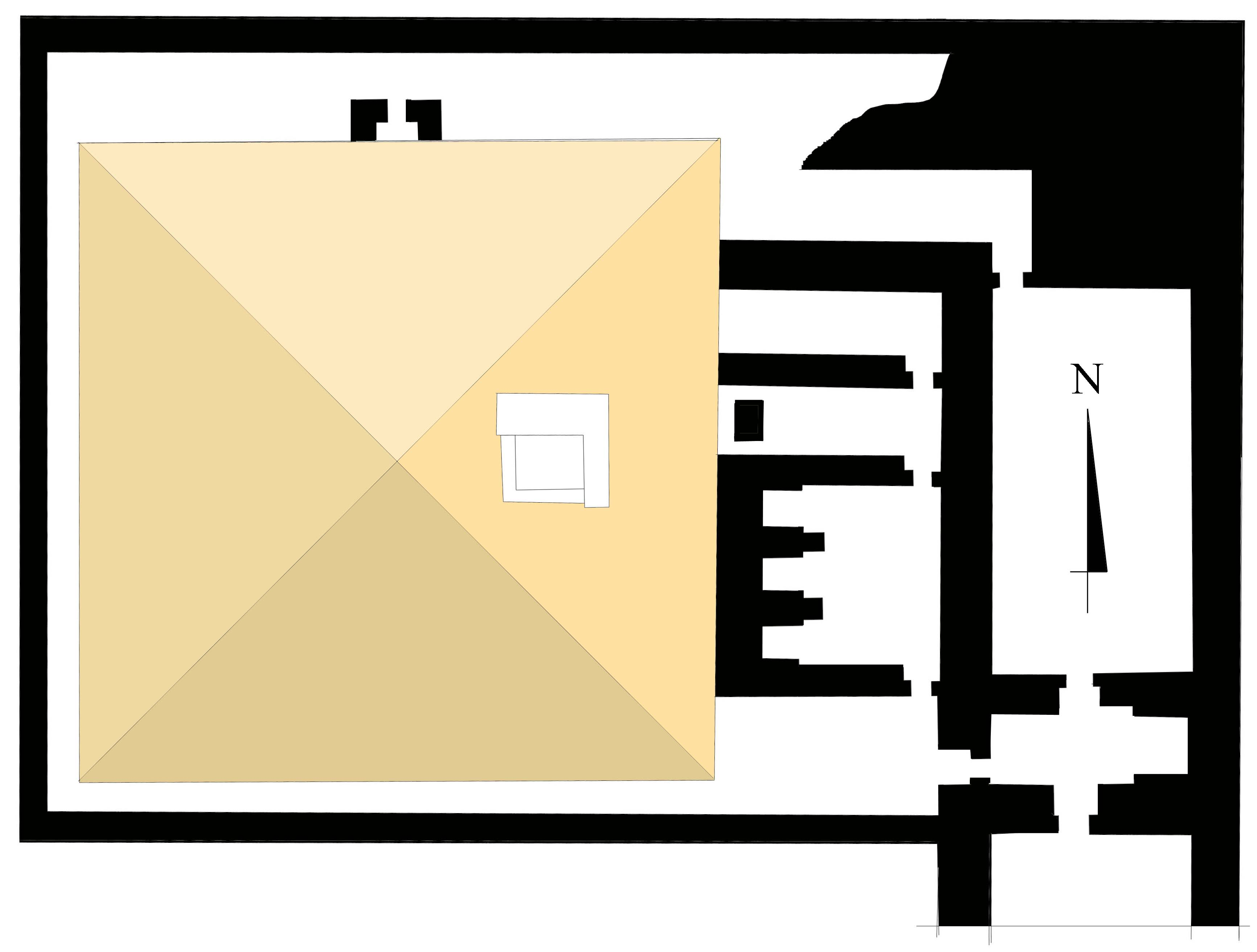 Plan du complexe funéraire de la reine Khouit Ipout Ire à Saqqarah